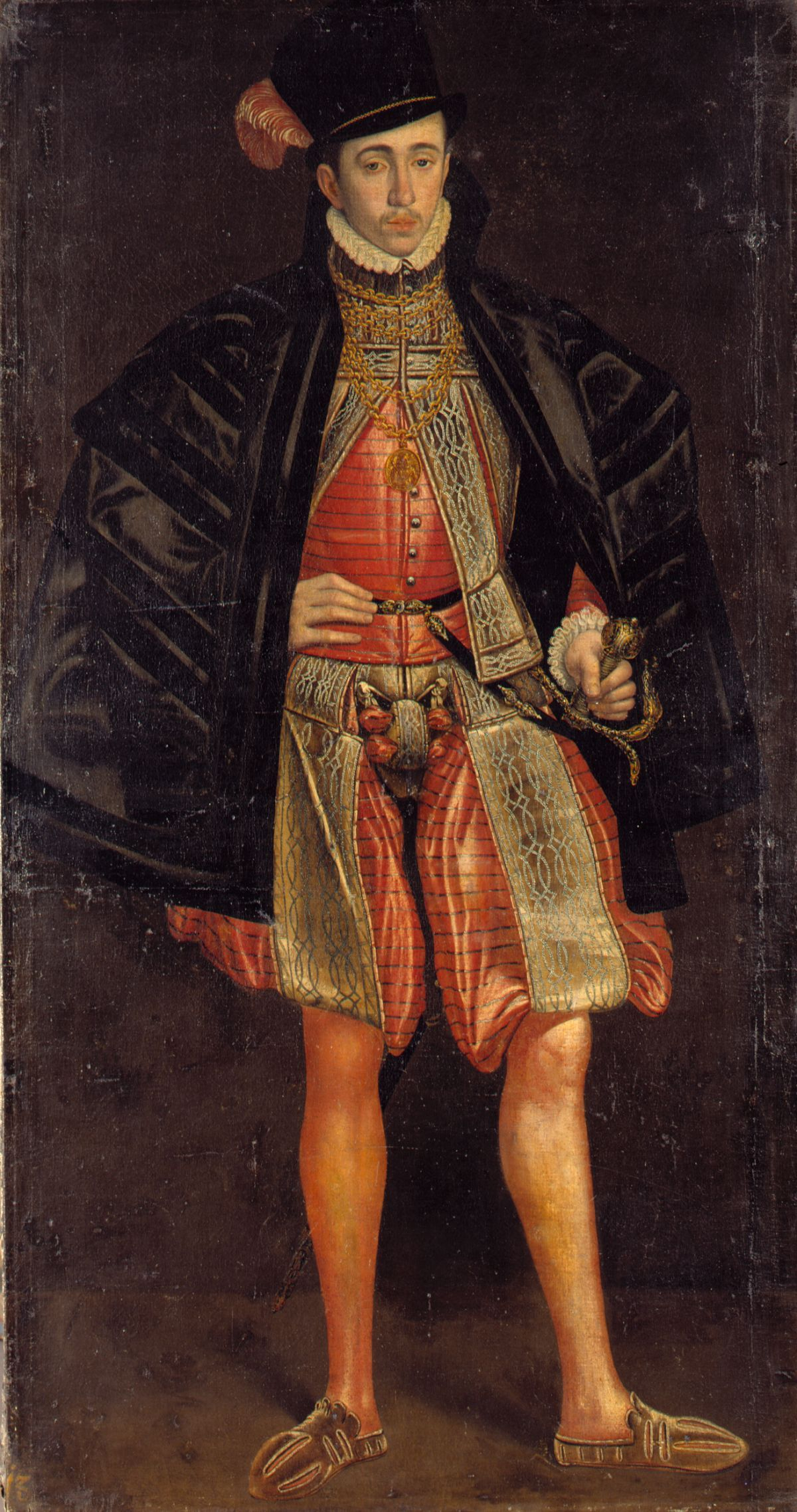 Bildnis eines Pfalzgrafen von Zweibrücken-Veldenz, möglicher Karl, Pfalzgraf von Birkenfeld